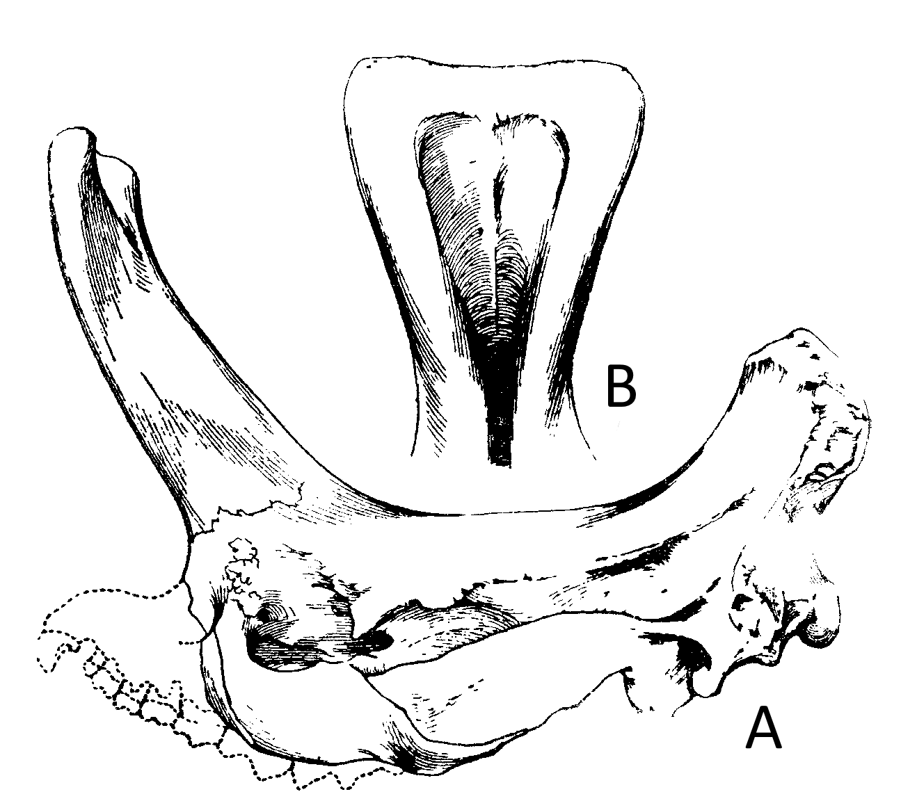 Embolotherium andrewsi. Череп. А - вид сбоку, B - роr спереди